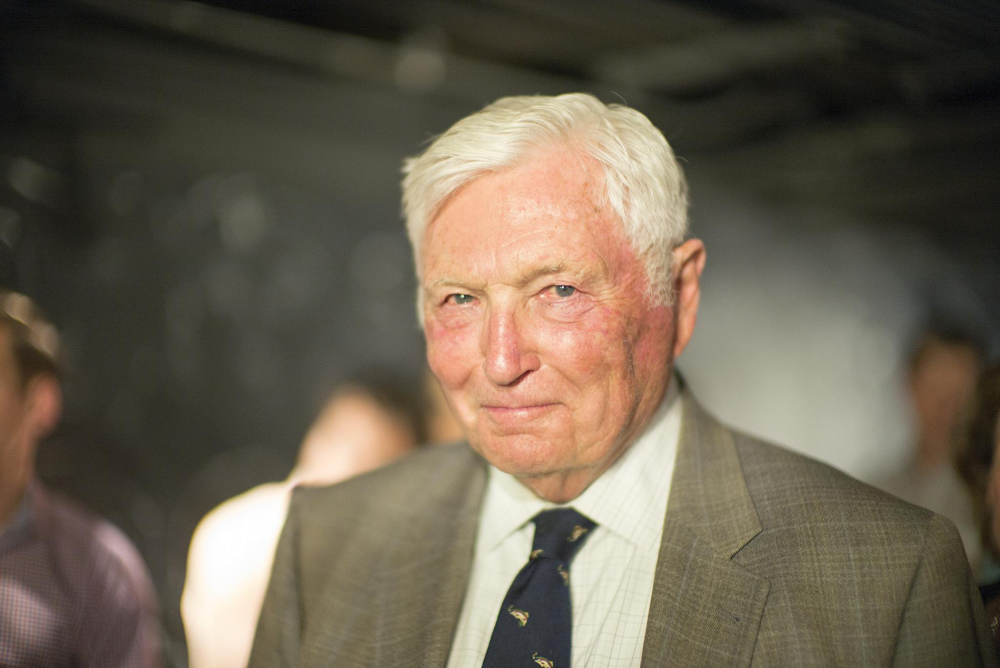 pitch johnson